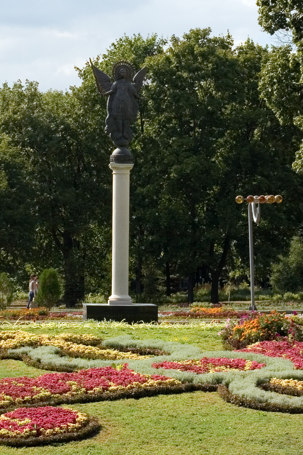 Shevchenko park-Kiev present (Kharkov). Статуя Архангела Михаила - герб Киева - подарок Киева Харькову. Установлен в саду Шевченко в начале 2000-х годов.